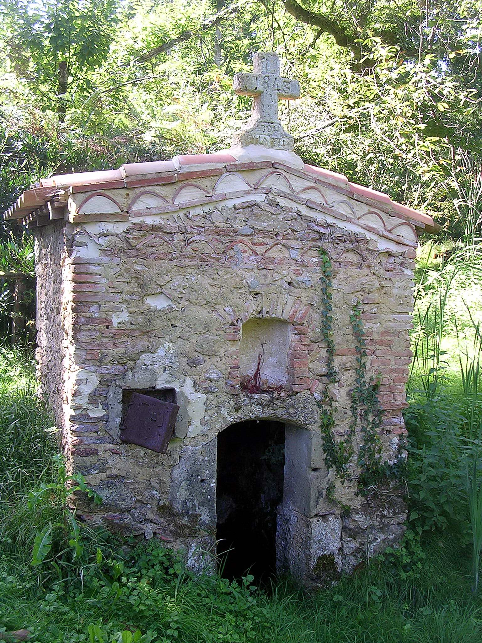 Laglorieuse, fontaine dédiée à Saint-Guirons